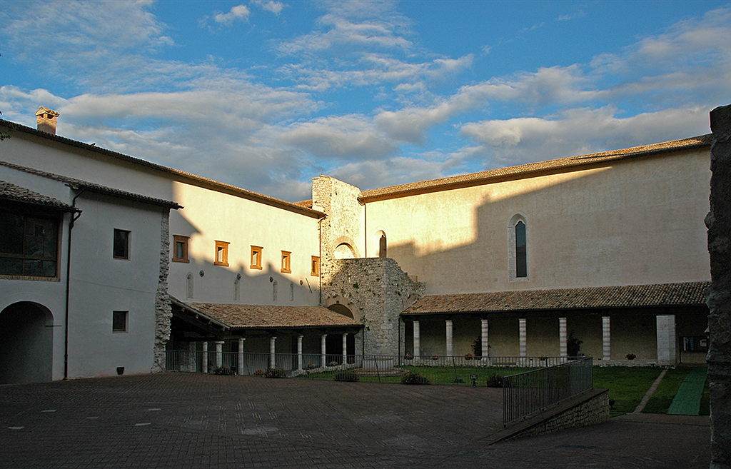 Spoleto - Chiostro di San Nicolò